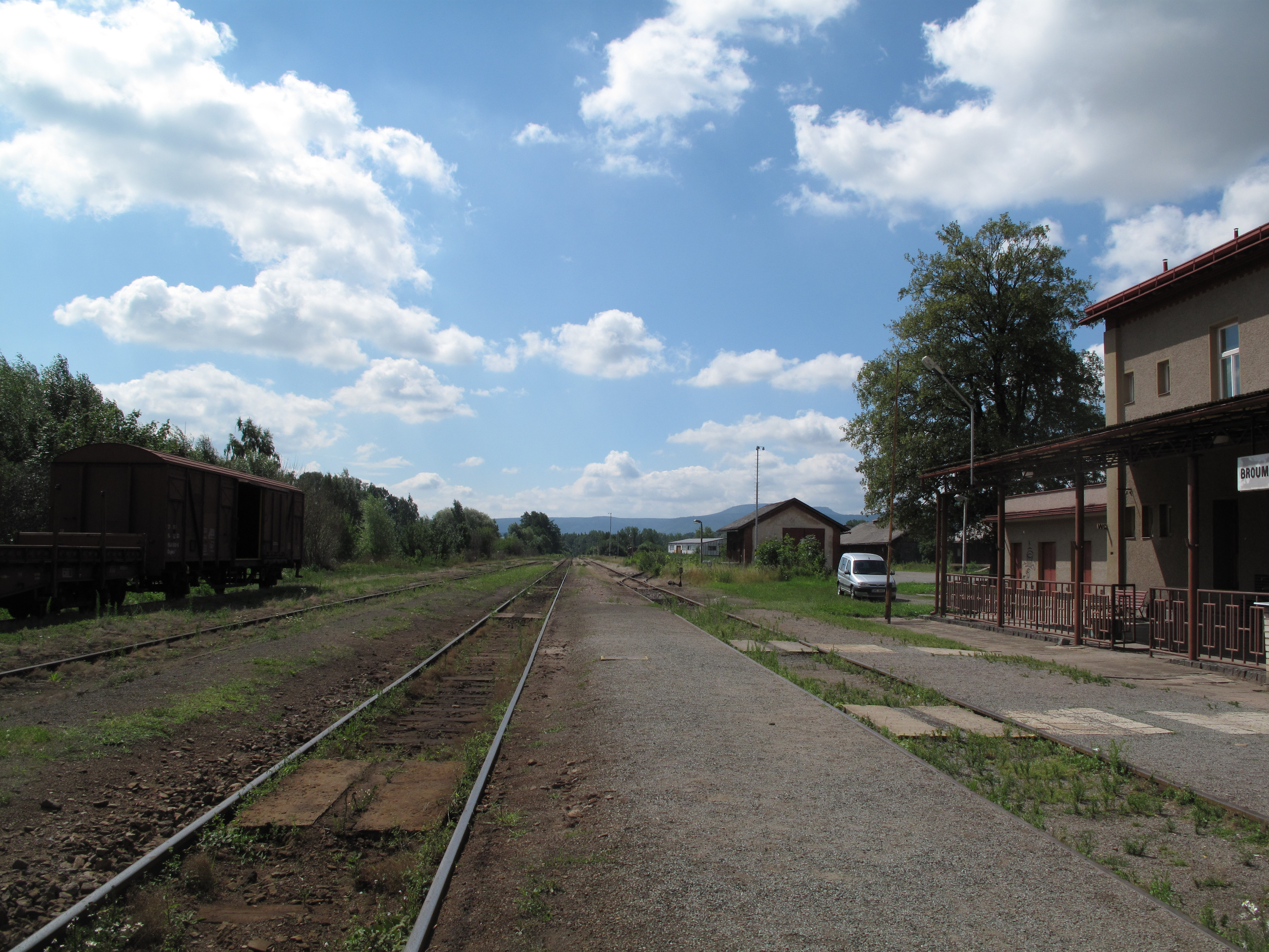 Česky: Broumov, vlakové nádraží